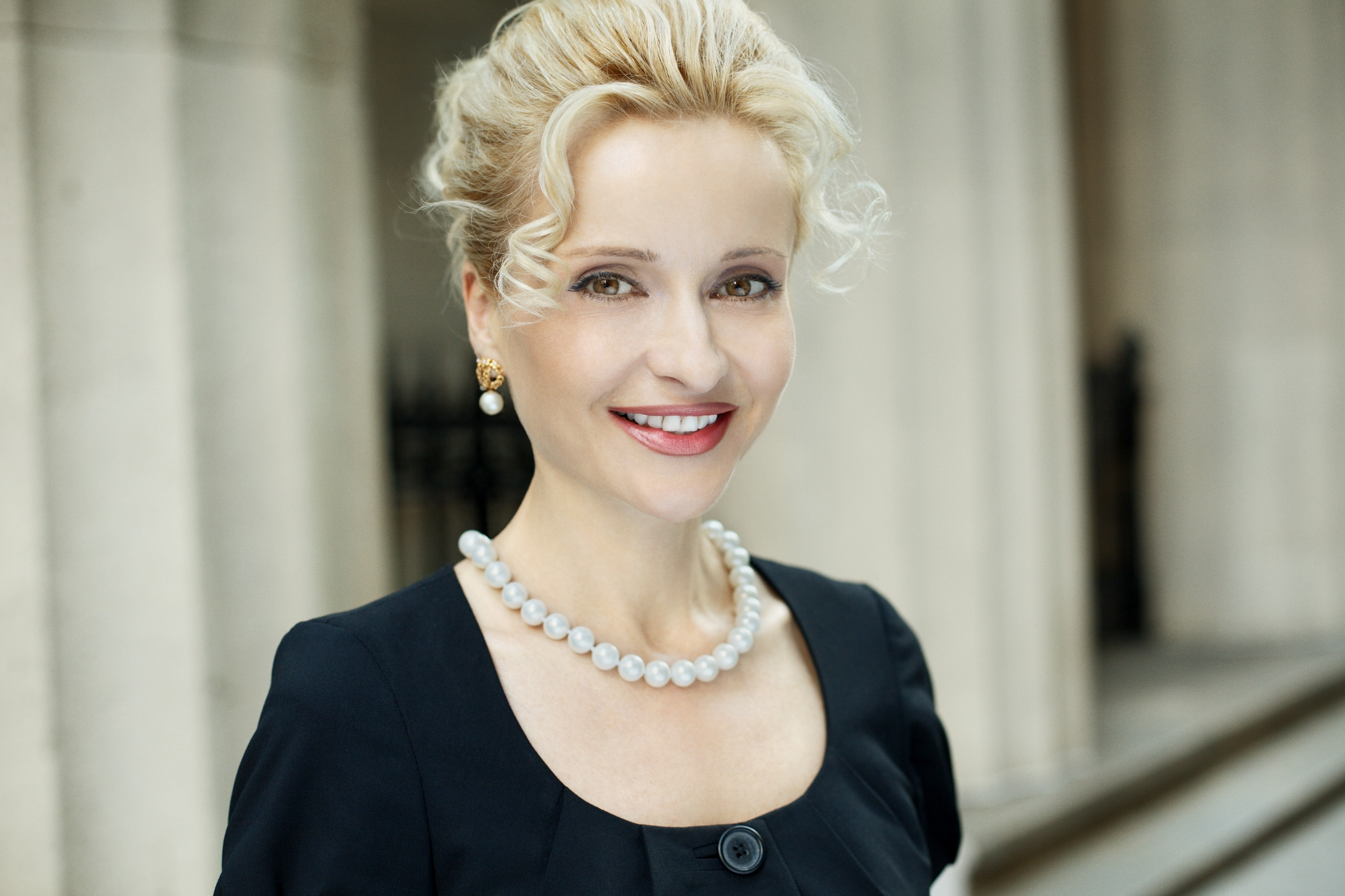 Sandra Navidi – Juristin, Autorin und CEO von BeyondGlobal LLC, 2011